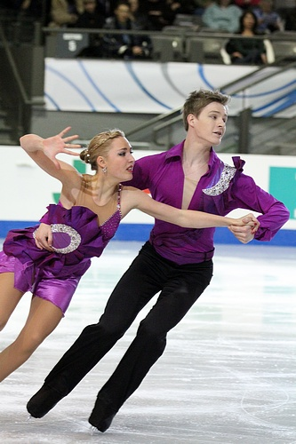 Мария Носуля и Евгений Холонюк на финале Гран-при среди юниоров сезона 2011-2012